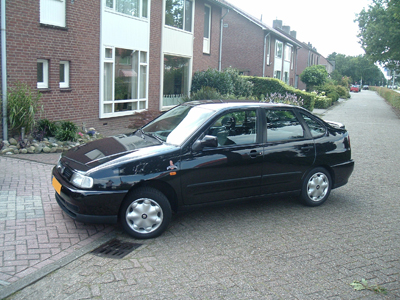 Seat Córdoba